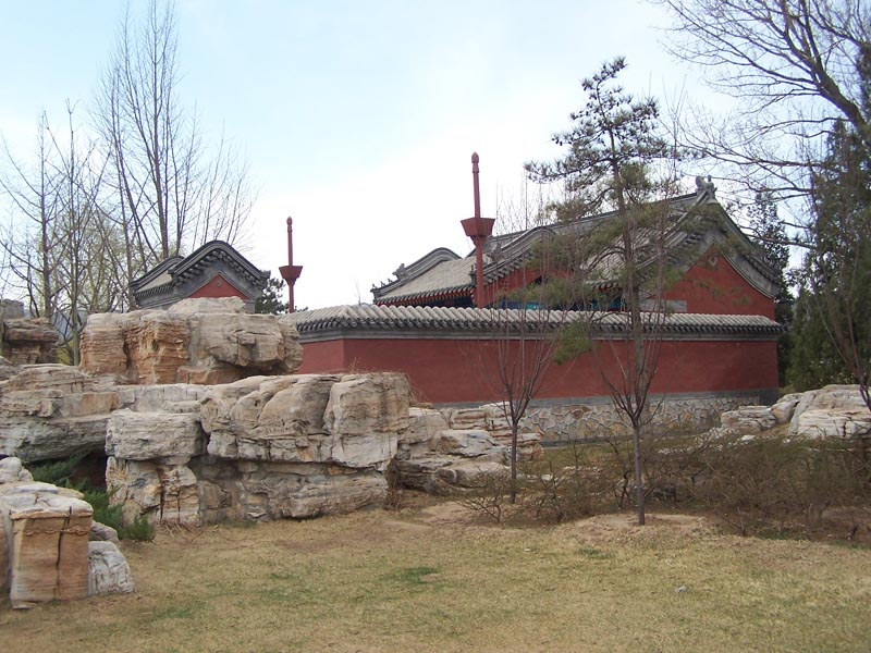 Summer Palace, Beijing